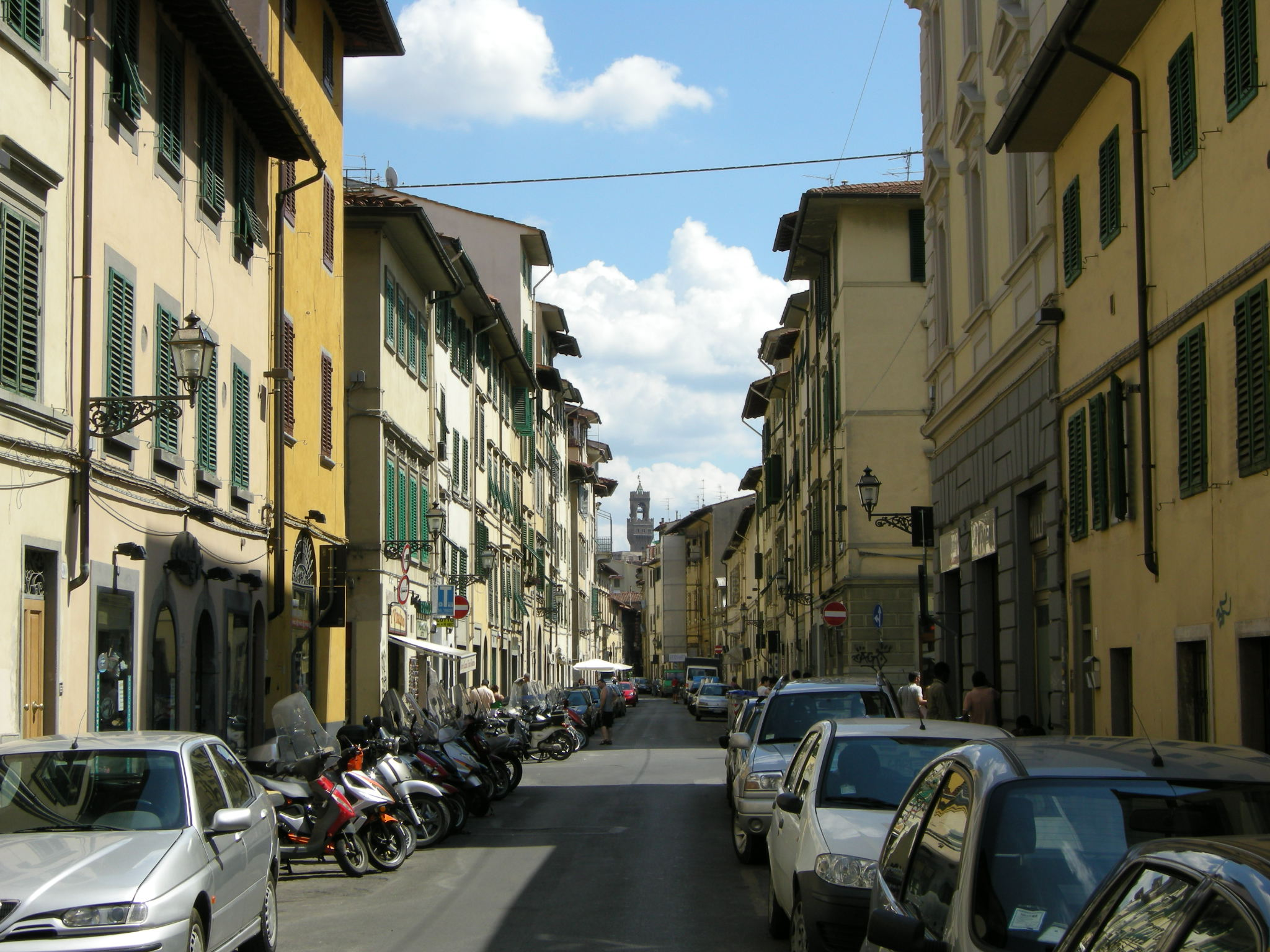 Via palazzuolo